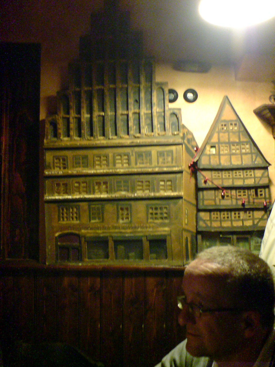 Bilder vom Stammtisch (Treffen der Wikipedianer 2011 in Hannover in der Eckkneipe "Das kleine Museum" in Hannover-Linden, Grotestraße 10/Ecke Ahlemer Straße. Die miese Bild-Qualität meines Foto-Handys bei Kerzen- und Schummerlicht bittet der Urheber höflich zu entschuldigen.